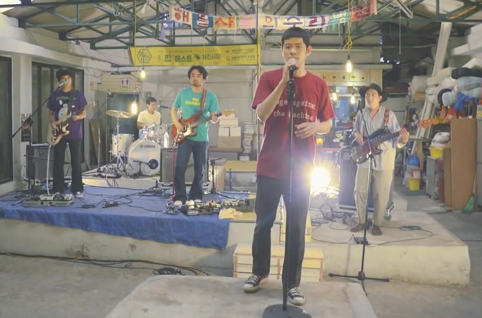 '내 사랑에 노련한 사람이 어딨나요'를 공연하는 대한민국의 밴드 장기하와 얼굴들